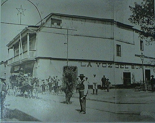 Instalaciones del diario La Voz del Sur.